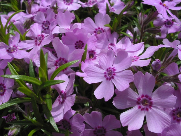 Phlox pilosa, 7 mai 2004, Jardin alpin, Jardin des Plantes de Paris